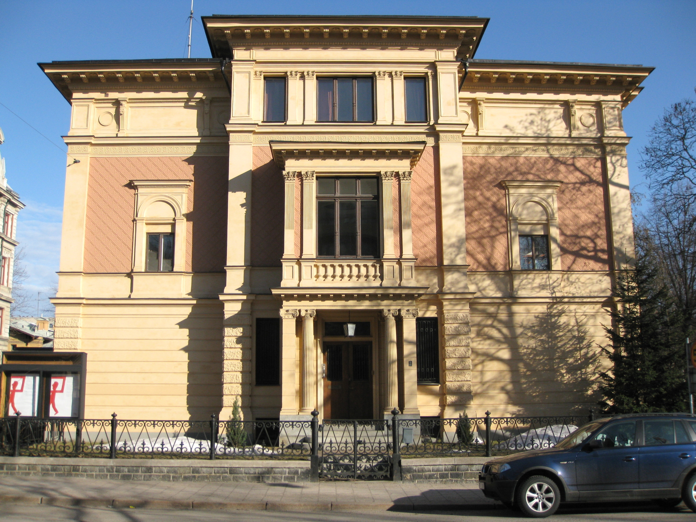 Polska institutet, Villagatan 2, Östermalm, Stockholm